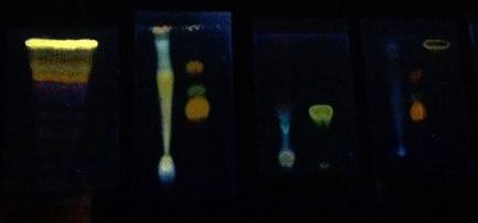 Fluorescencia en Flavonoides.